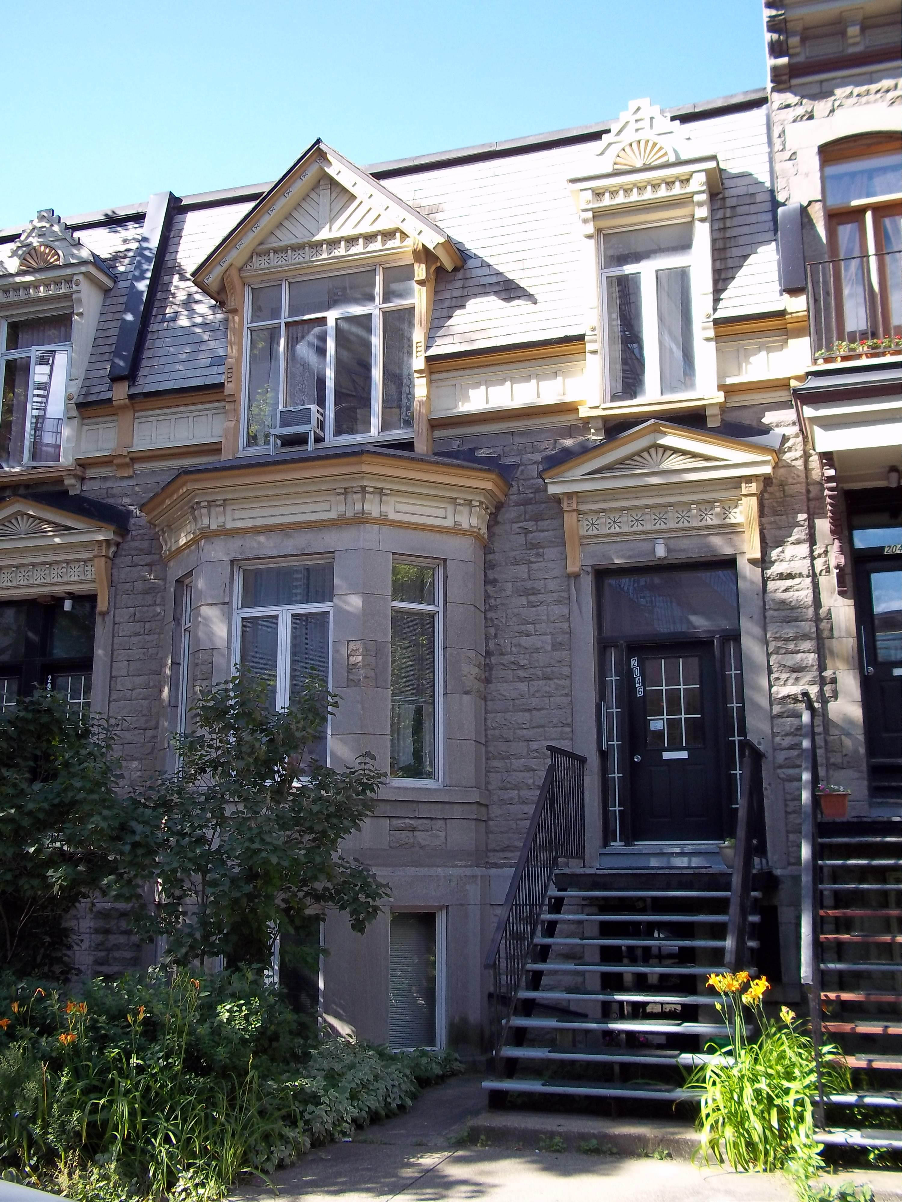 Maison John T.-Haggar, 2044-2046, rue Jeanne-Mance, Montréal